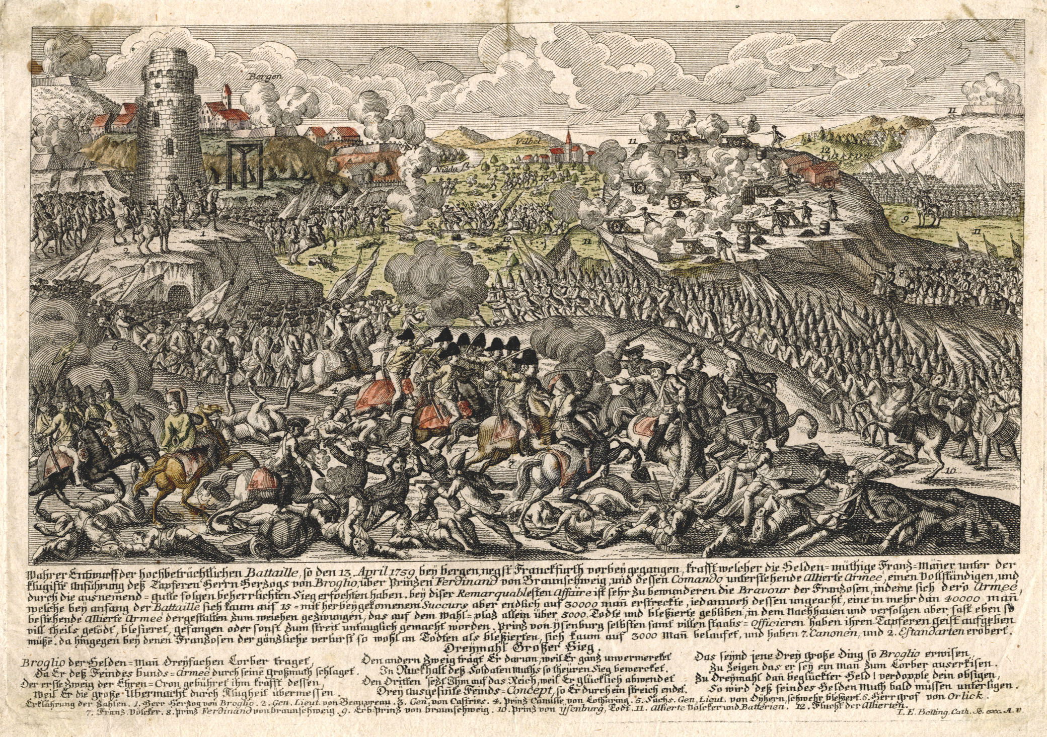 Перемога герцога де Броя під Бергеном, 13 квітня 1759 р. Під № 6 зображено Г. Орлика. Автор невідомий. Гравюра XVIII ст.